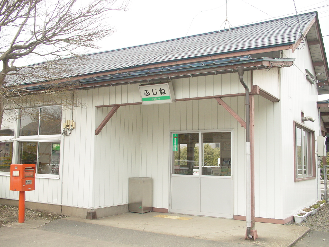 （藤根駅）